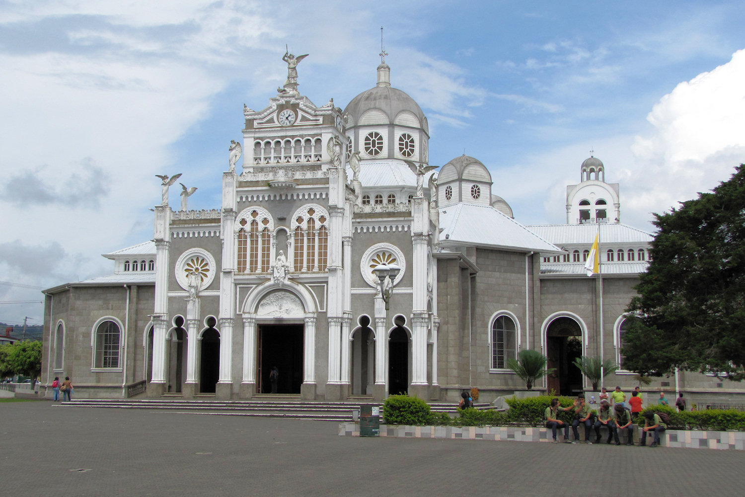 Basílica de Nuestra Señora de los Ángeles, Cartago, Costa Rica.